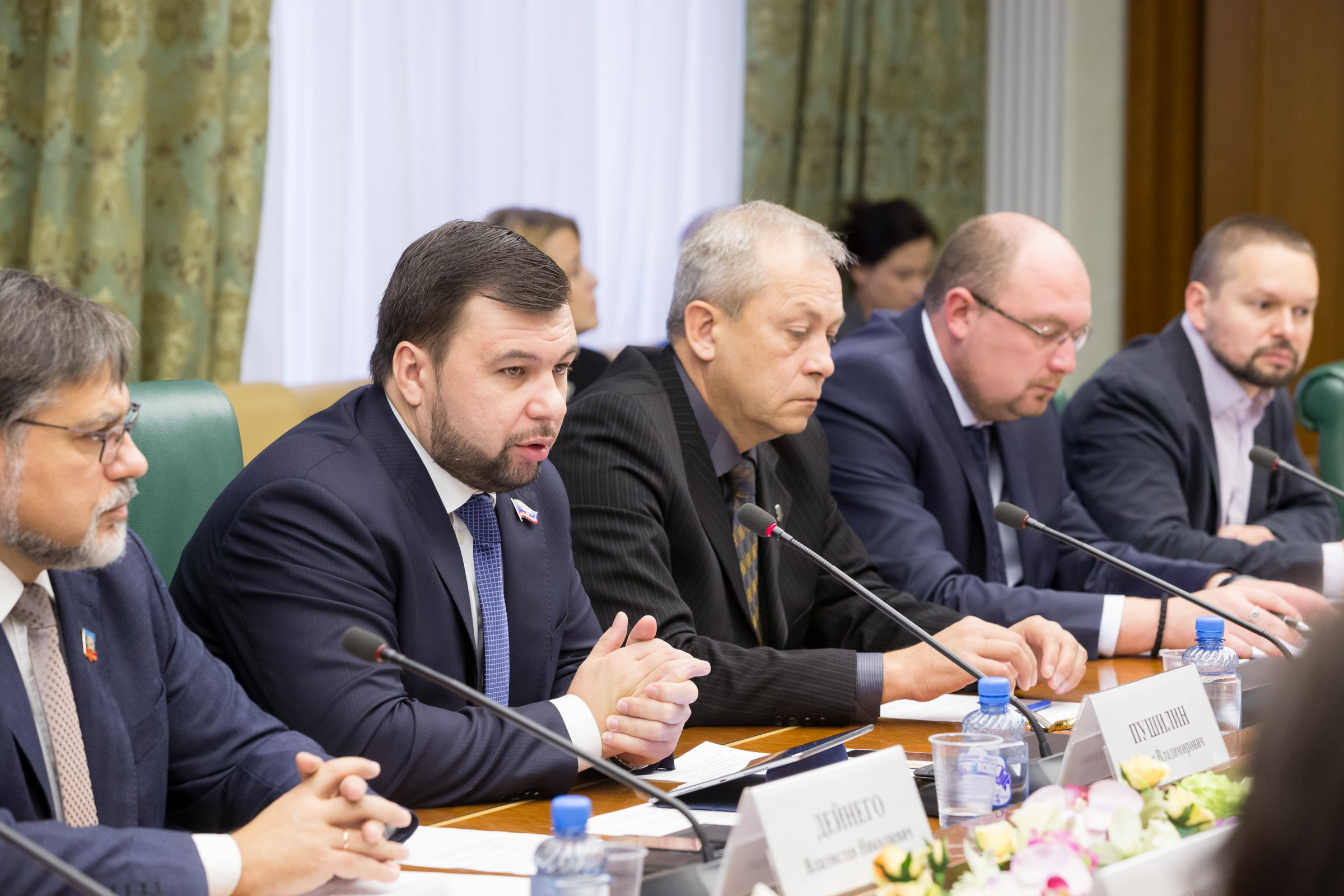 Эдуард Басурин (род. 1966) — государственный деятель непризнанной Донецкой Народной Республики.